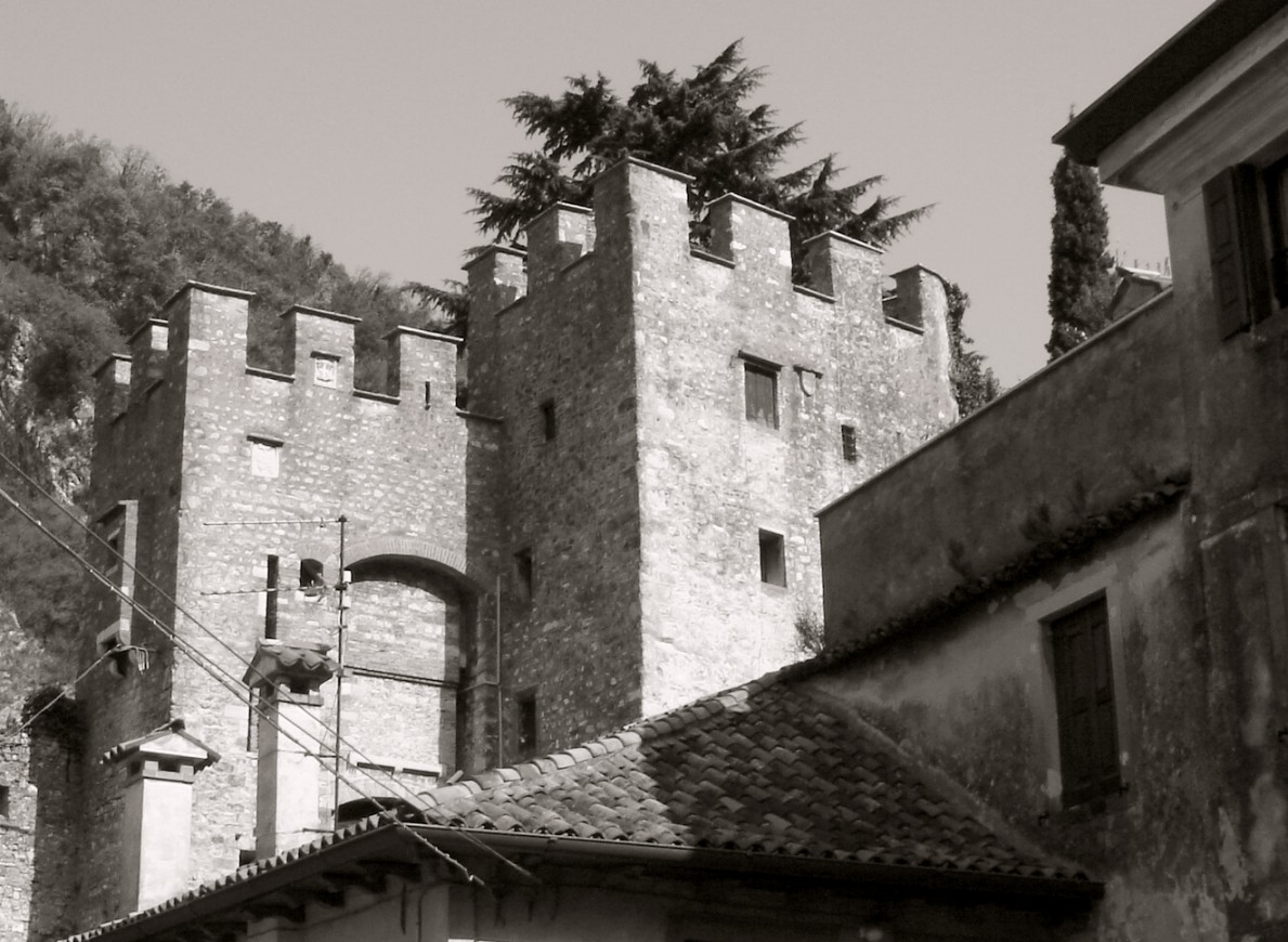 Serravalle di Vittorio Veneto (Treviso): particolare dei resti dell'antico castello.